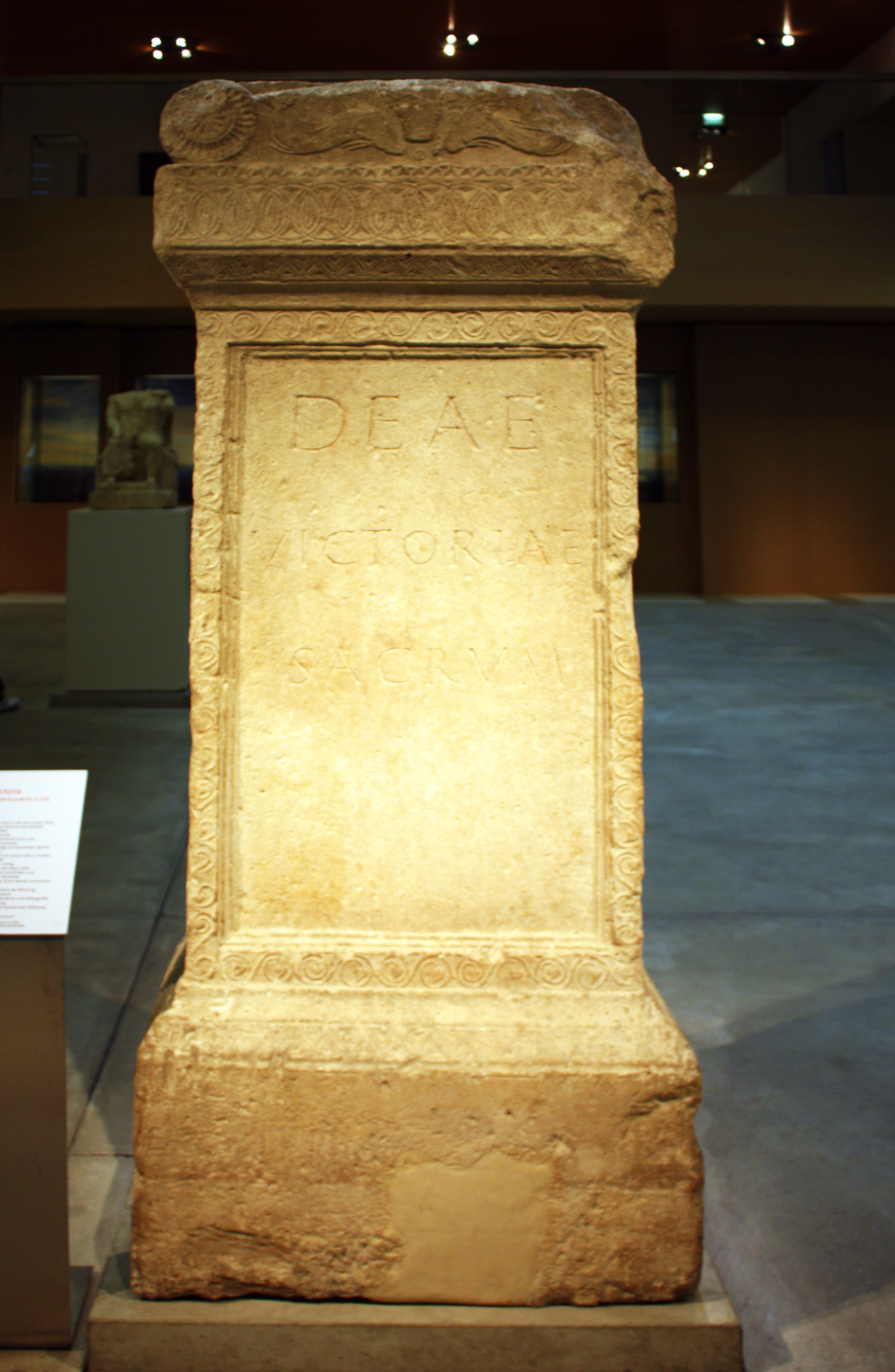 Köln, Flottenlager Alteburg (Köln-Marienburg). Weihegeschenk in Form eines Altarsteines als Dank für die Erfüllung einer Bitte, der Stifter ist jedoch unbekannt. Der für die Siegesgöttin „Victoriae“ errichtete Stein entstammt de 1. Hälfte des 3. Jahrhunderts und ist an allen Seiten mit kerbschnittartigen Ornamenten verziert. Auf der Rückseite symbolisieren Delphine die Rheinflotte. Begleittext und Ort der Ausstellung: Rheinisches Landesmuseum Bonn. CIL XIII 8252 = RSK 147 = IKoeln 208: Deae/ Victoriae/ sacrum